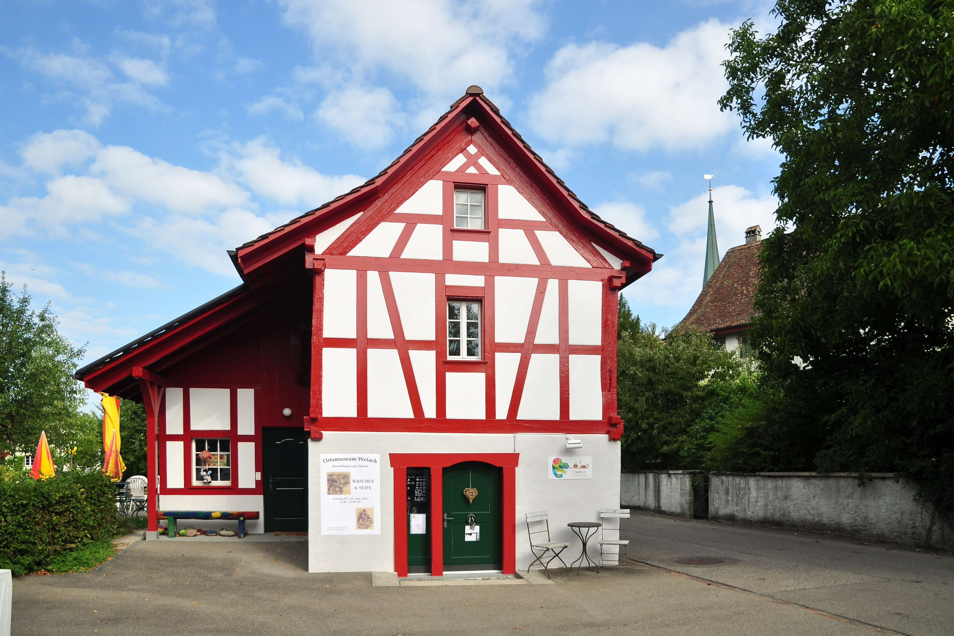 Speicher des Baumgartner-Jucker-Hauses, Büelstrasse 18 in Weiach (Switzerland)